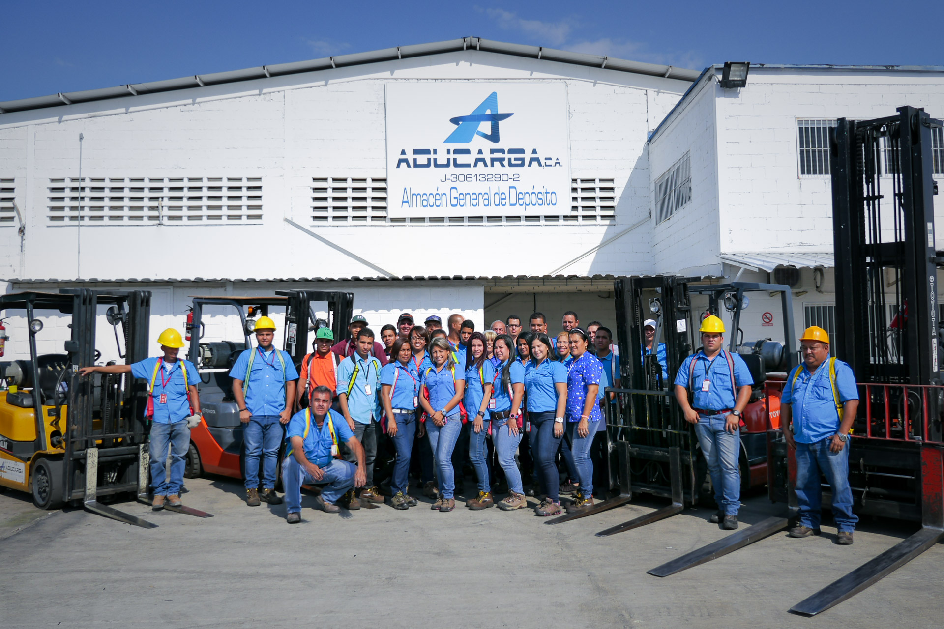 Carlos Luis Michel Fumero, presidente de Aducarga (almacén general de depósito), y su equipo de trabajadores.